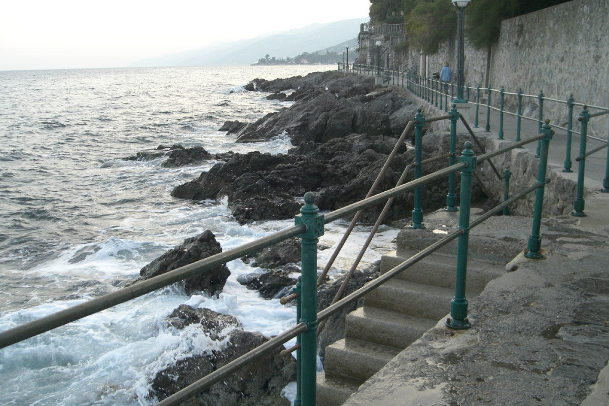 Lungomare in Volosko, Croatia.